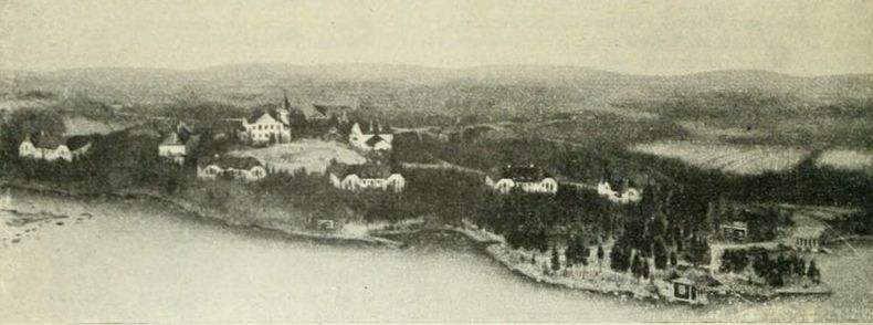 Kotiniemen kasvatuslaitos kuuluu valtakunnallisesti merkittäviin rakennettuihin kulttuuriympäristöihin, nykyisin siellä on Vilppulan vankla